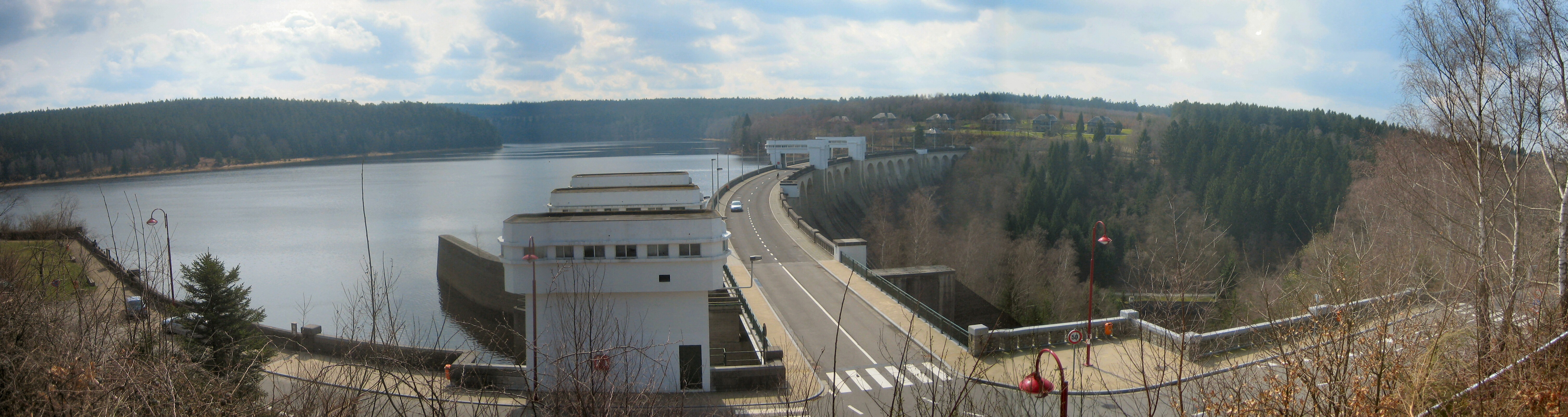 Weser talsperre Eupen Belgium Taken by Hullie 9 april 2006